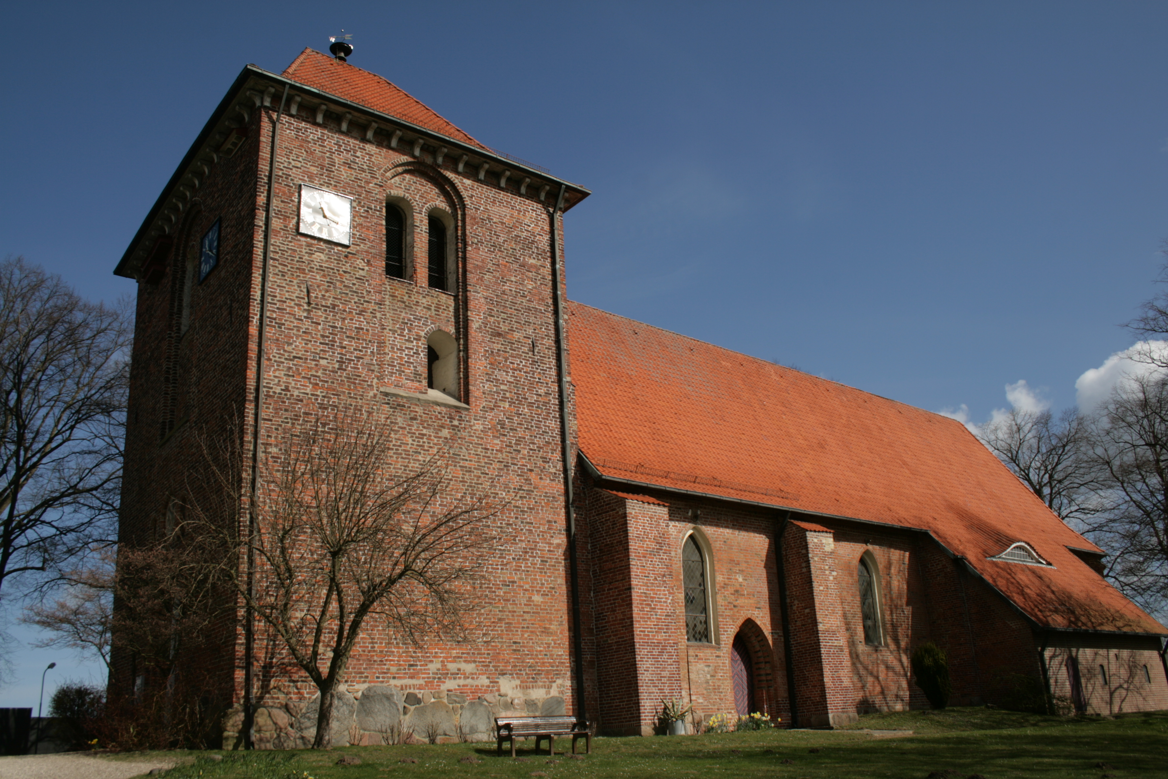 Kirche in Lensahn (Ostholstein) mit spätgotischem Turm